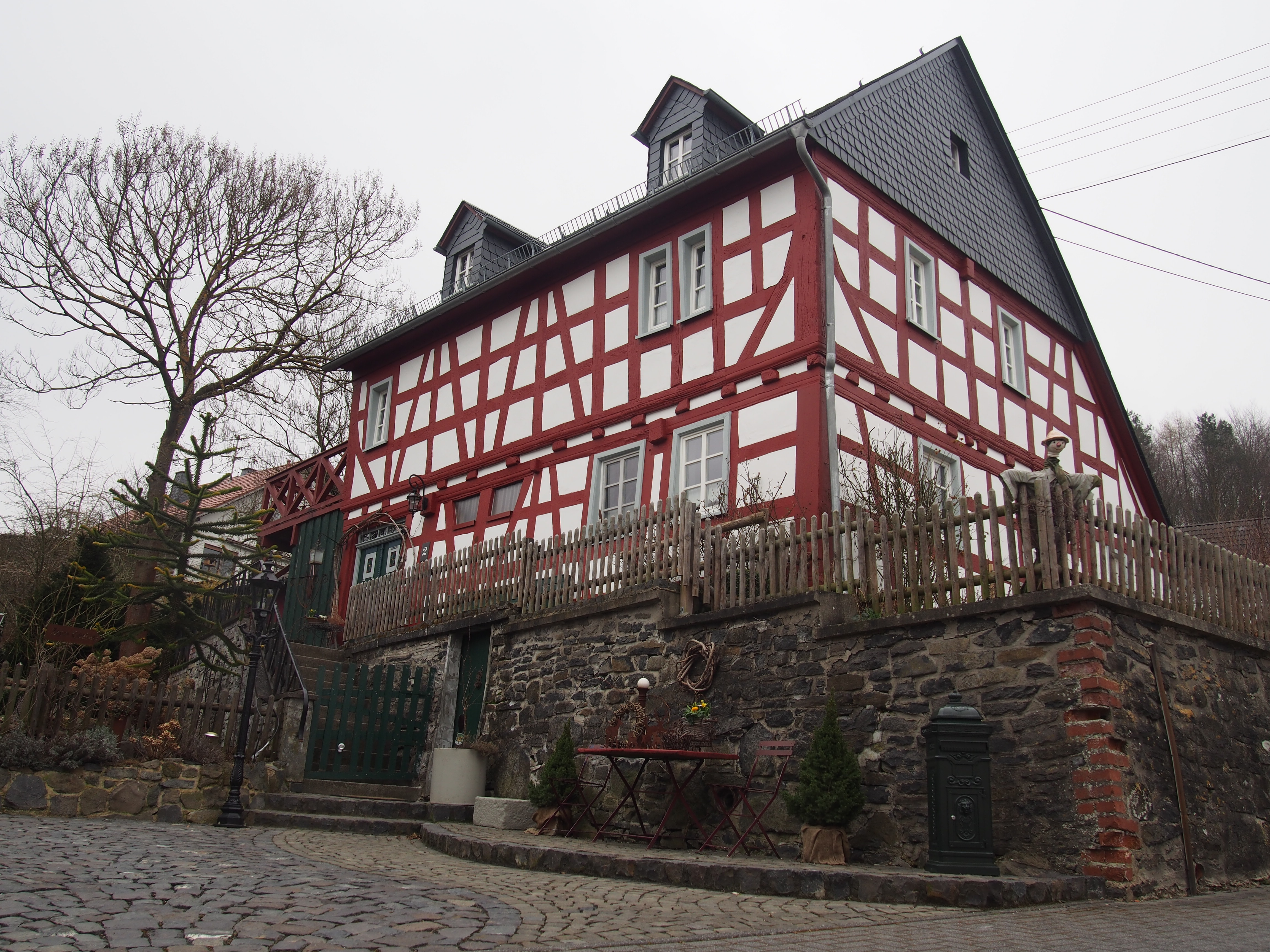 Das Fachwerkhaus (um 1700 erbaut) in Berod bei Wallmerod (Deutschland) zählt zu den Kulturdenkmälern des Dorfes.